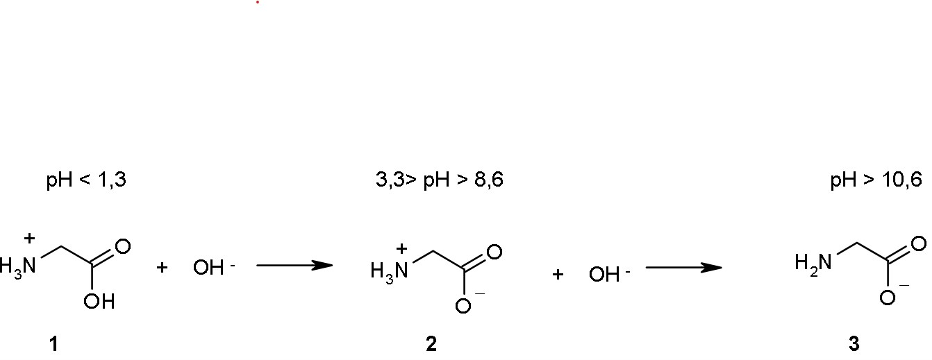 reações ácido-base da glicina